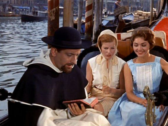 actors Riccardo Garrone, Niki Dantine and Ingeborg Schöner in the film Venezia, la luna e tu